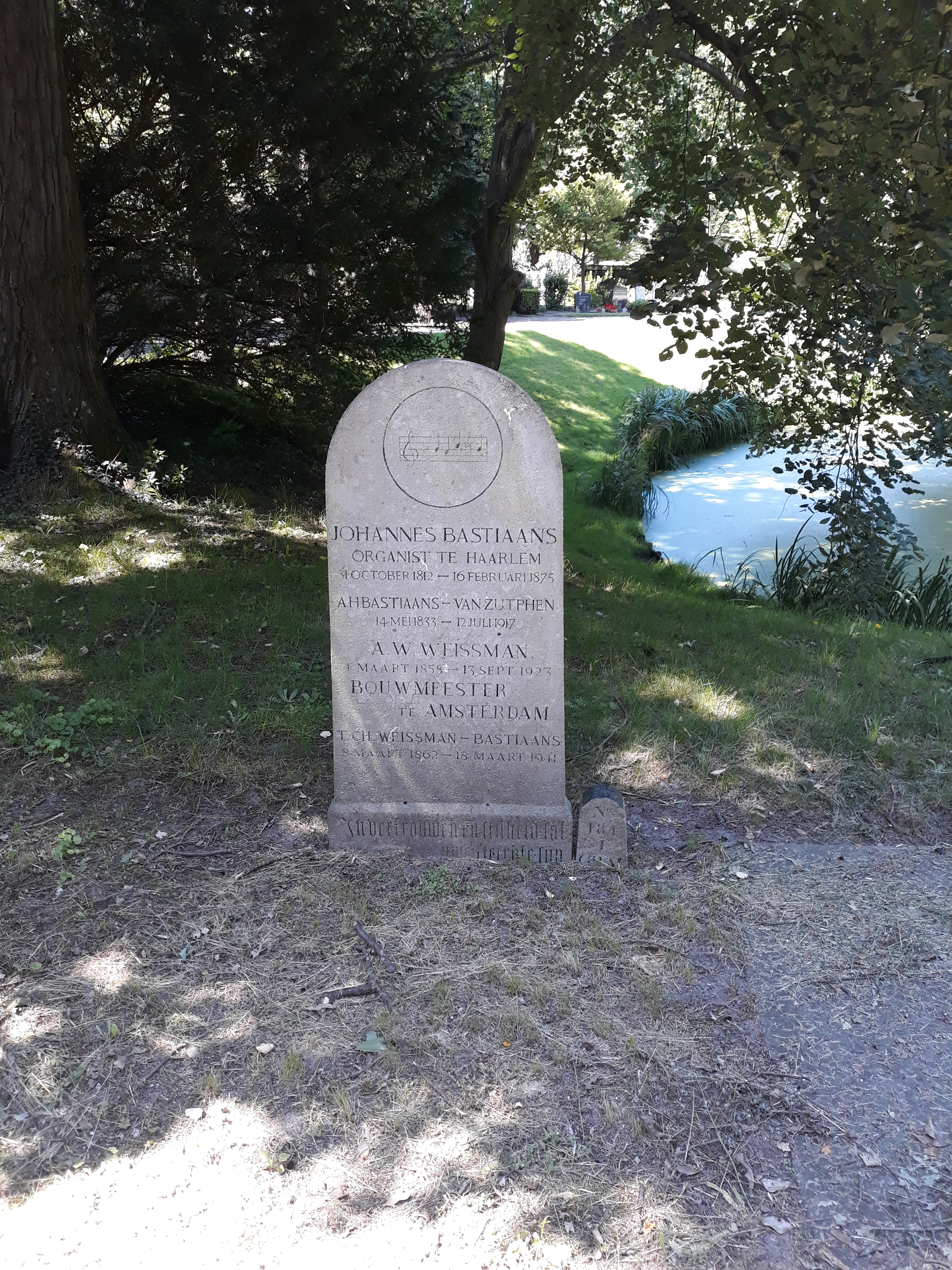 Das Grab des niederländischen Organisten und Komponosten Johannes Gijsbertus Bastiaans und des Amsterdamer Stadtarchitekten A. W. Weisman auf dem Friedhof Kleverlaan in Haarlem.